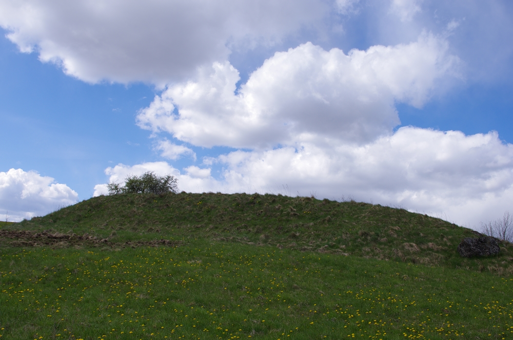 Bakšėnų piliakalnis